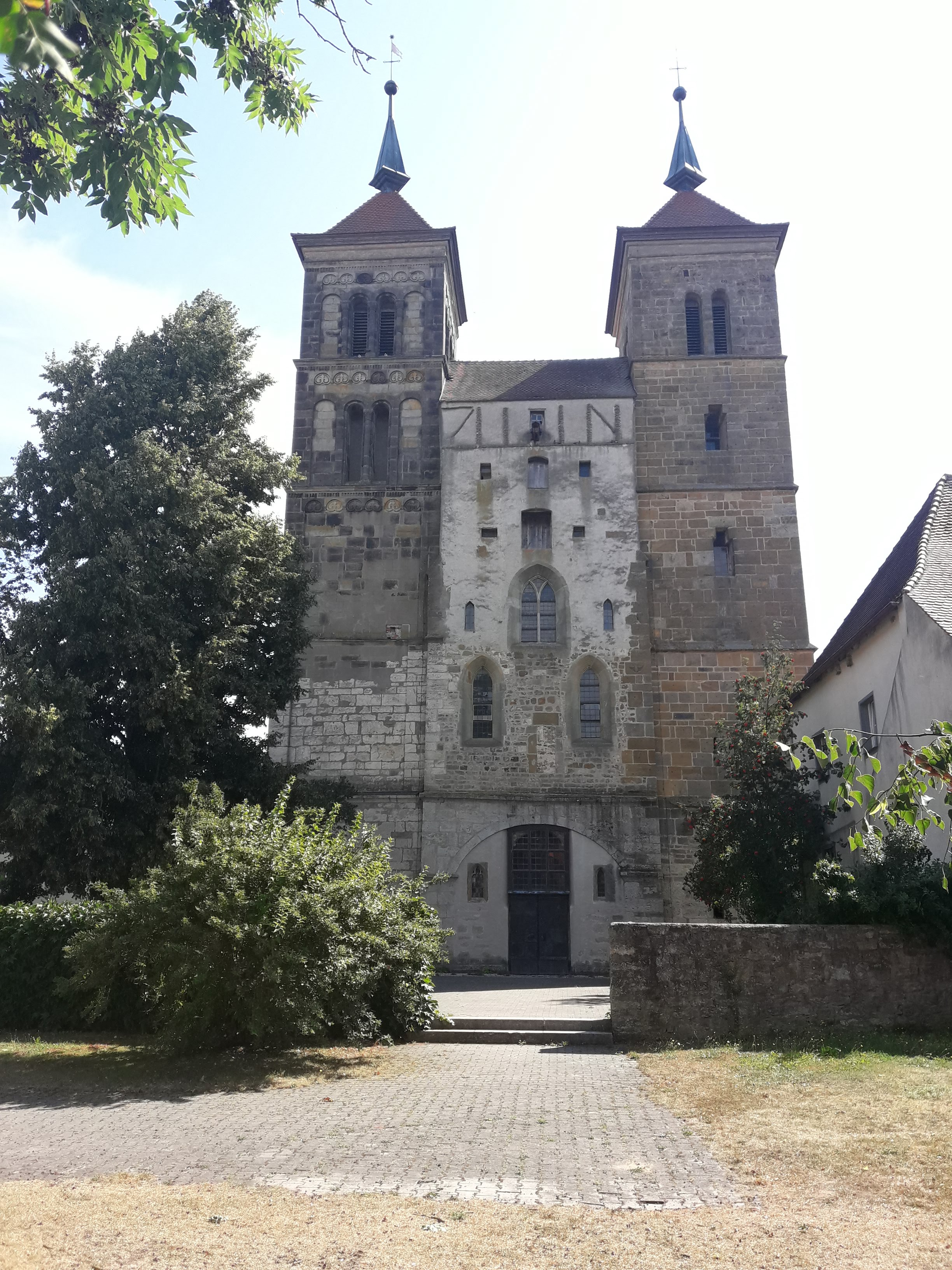 ehem. Klosterkiche Auhausen